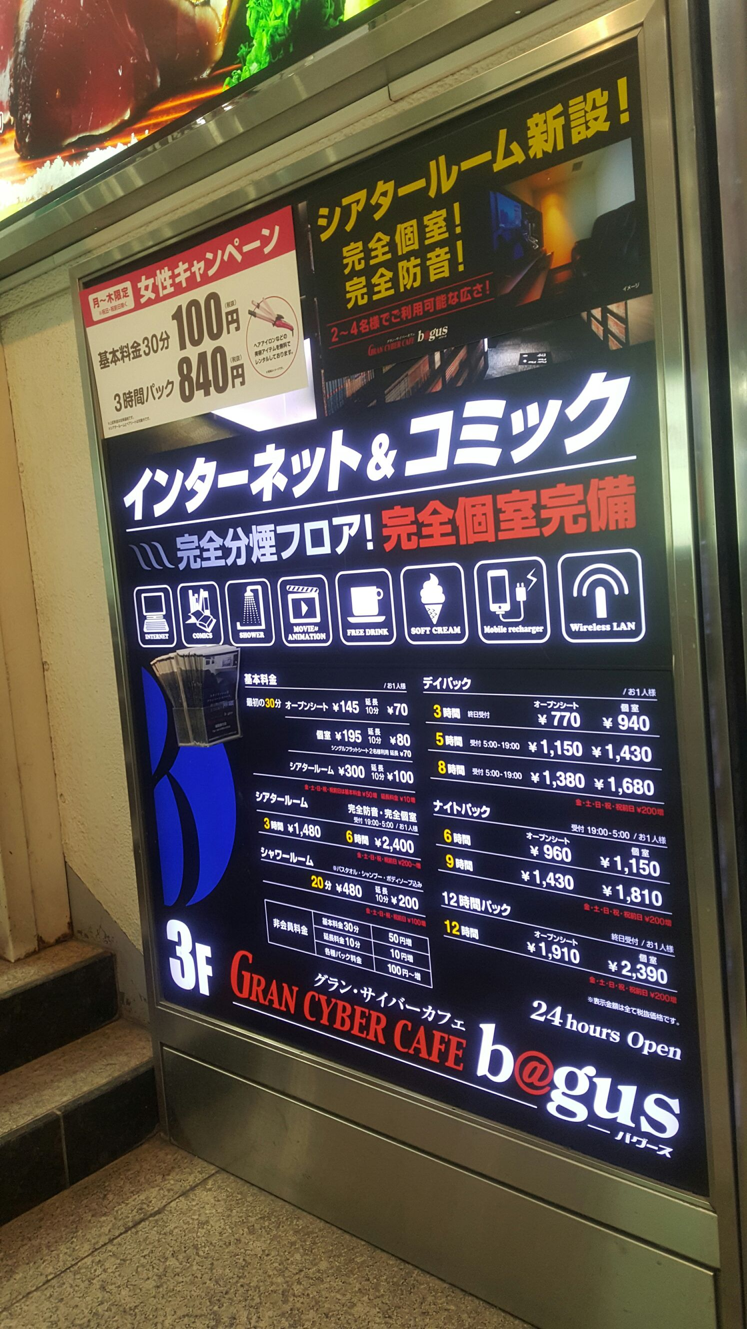 バグース新宿